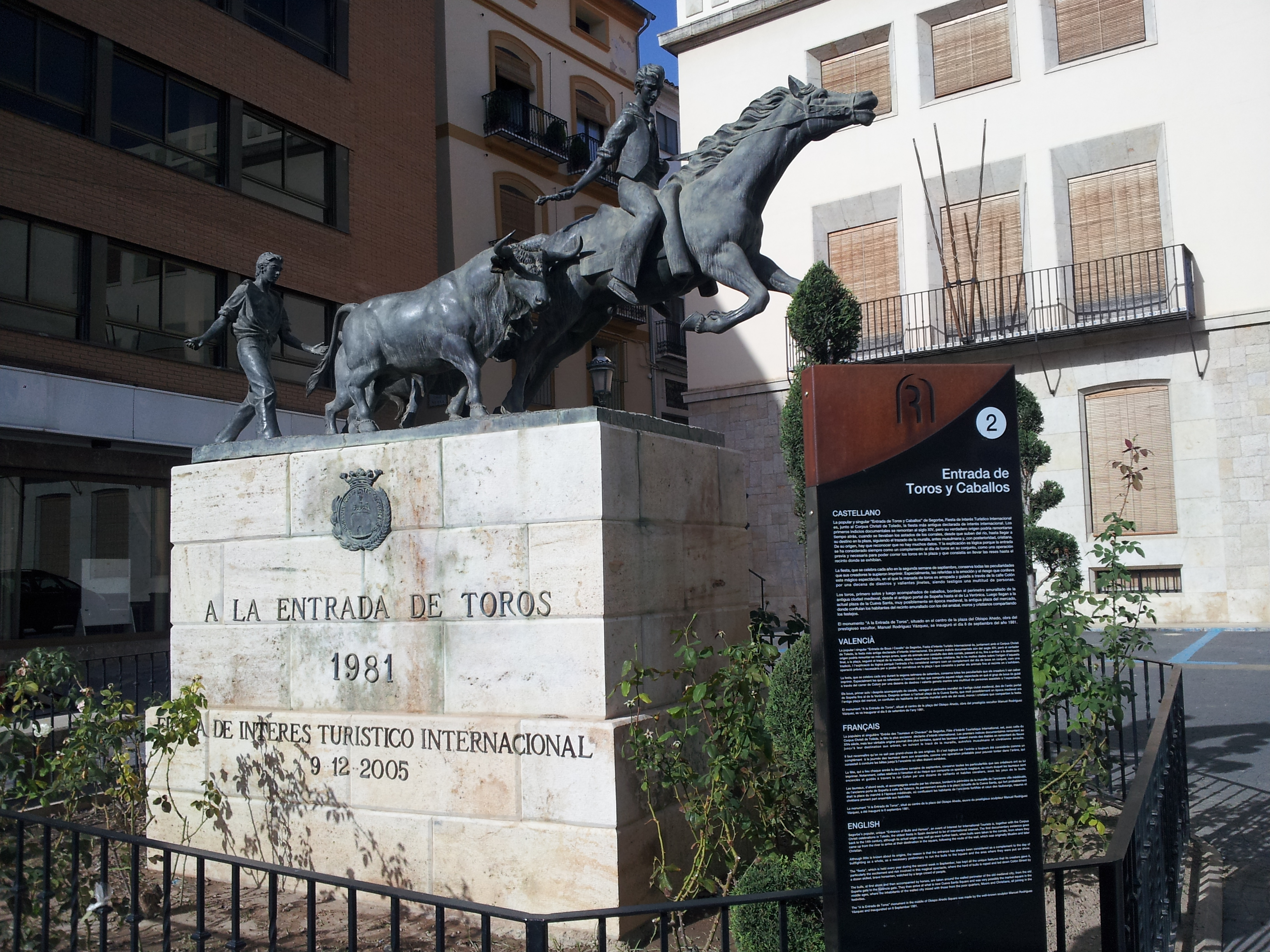 Monument a l'entrada de Bous i Cavalls de Sogorb.